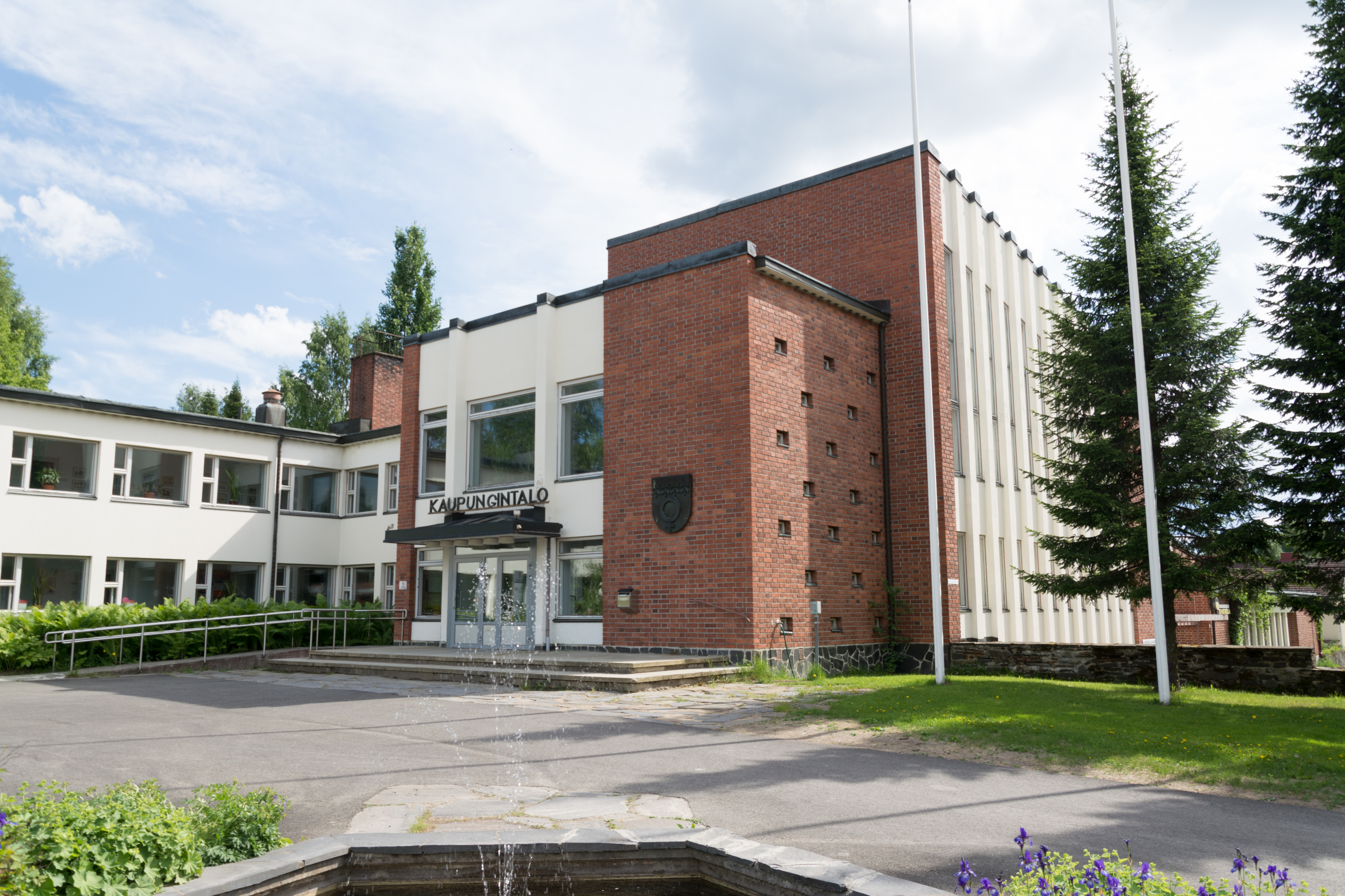 Outokummun kaupungintalo